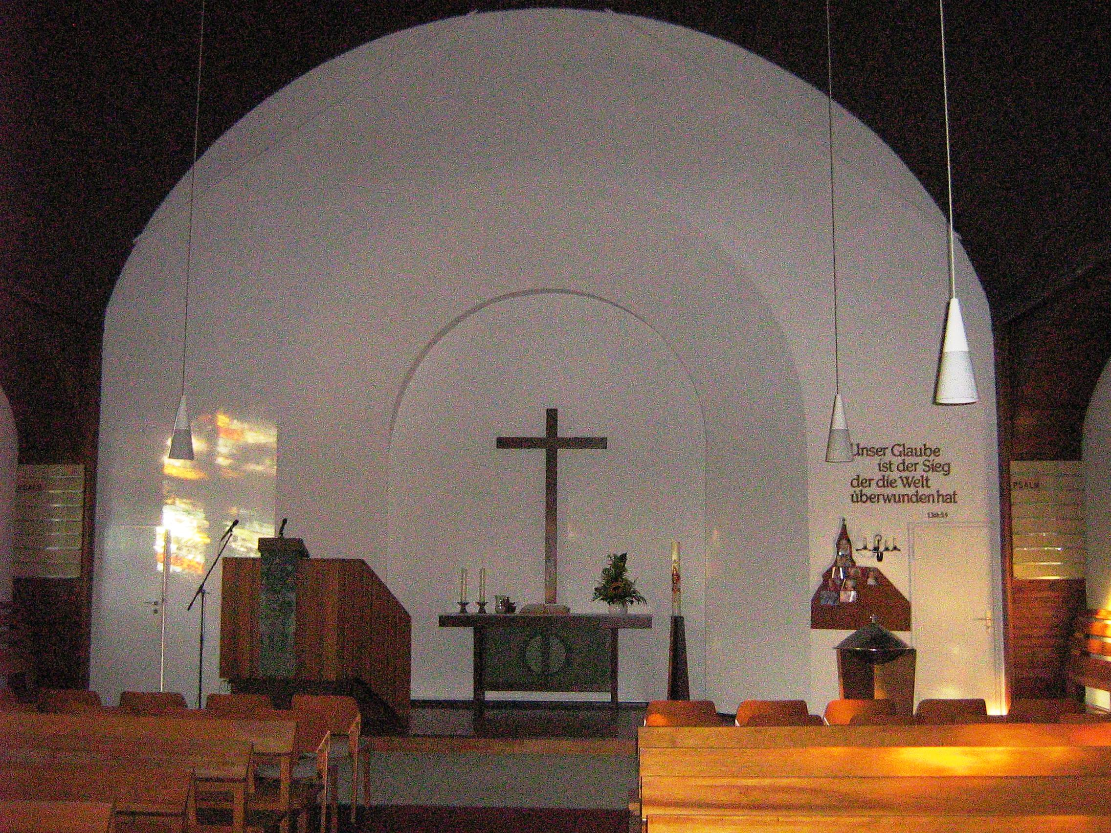 Evgl. Wichernkirche Berlin-Spandau, OT Hakenfelde, Inneres, August 2012